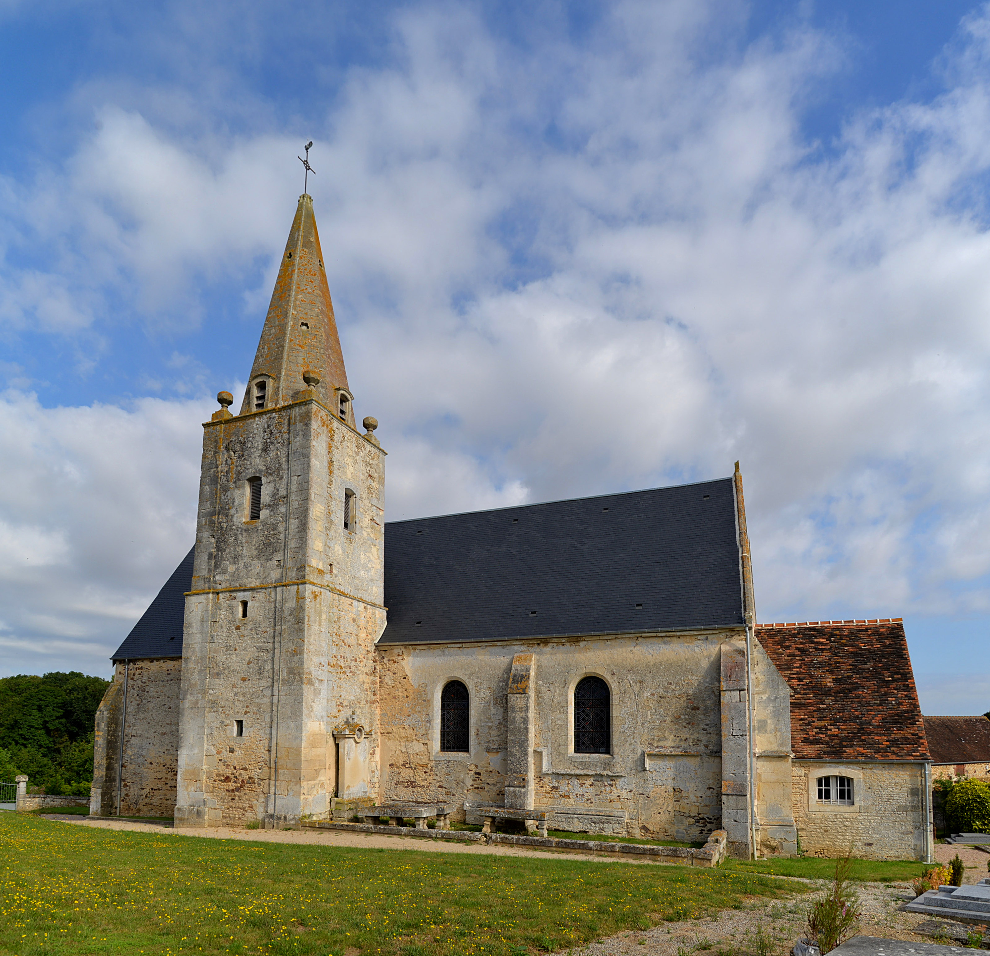 Guêprei (Orne)